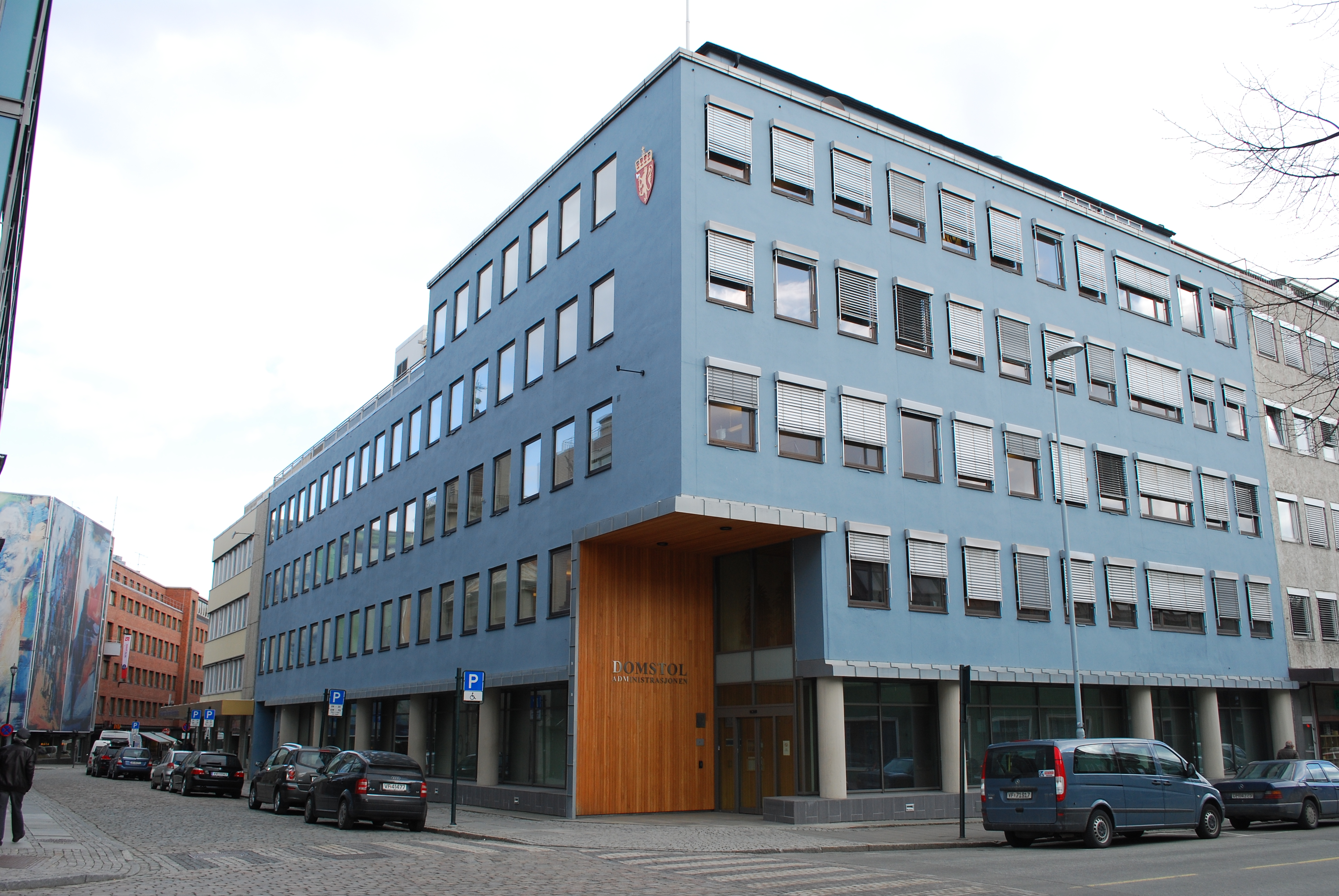 Domstoladministrasjonen ved Dronningens gate 2 i Trondheim.